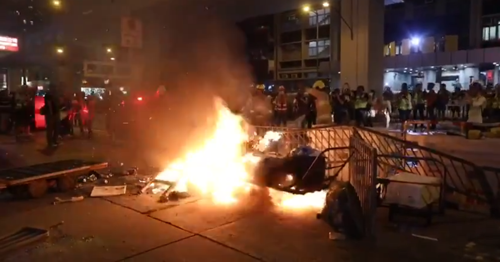 香港有示威者7日晚在旺角警署外点火